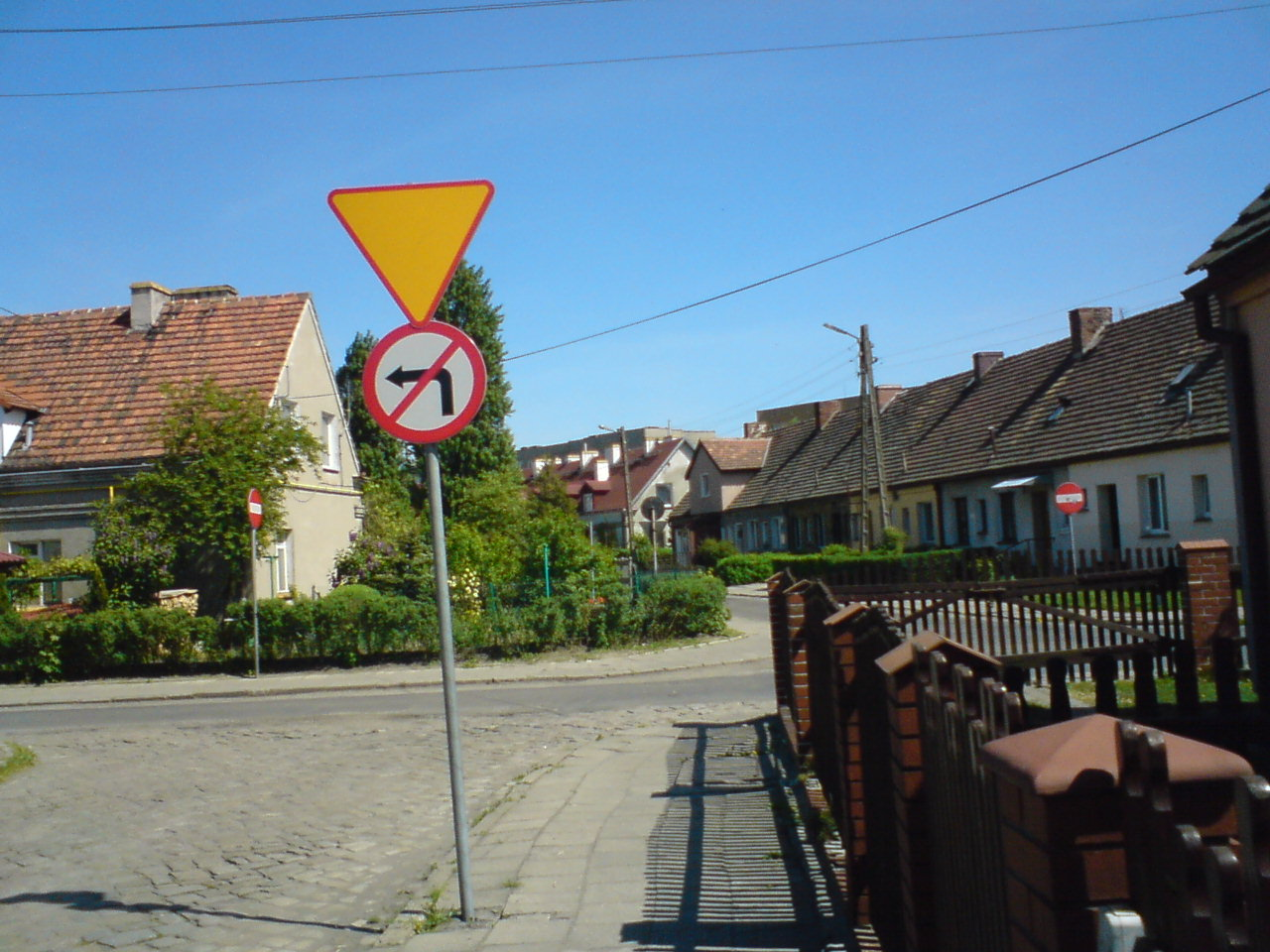 Osiedle Odbudowane (17-lutego Str.), Żary